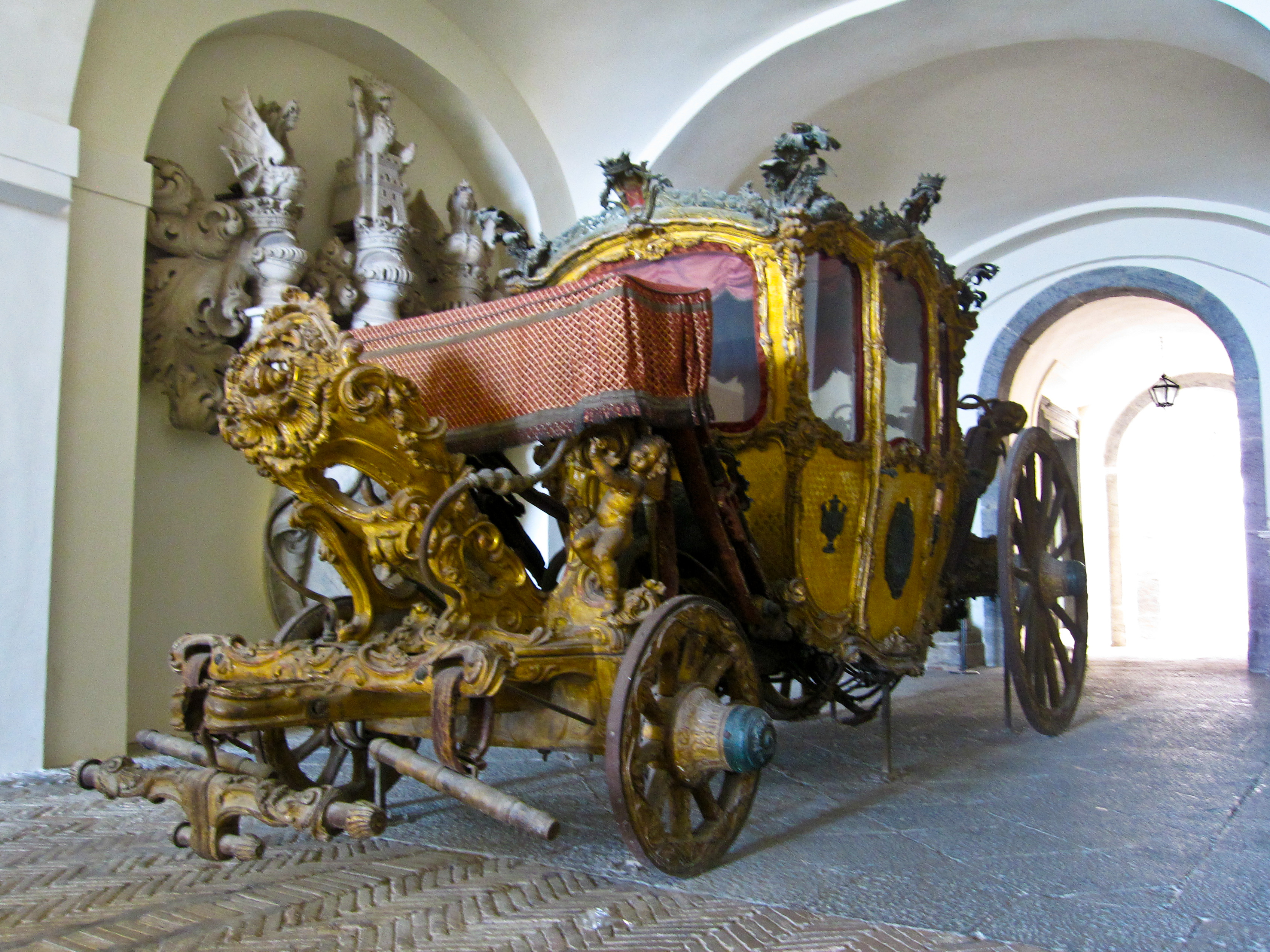 Una carrozza reale (Museo di San Martino - Napoli)